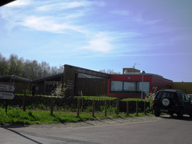 École maternelle Jean Ferrat de Longpont-sur-Orge